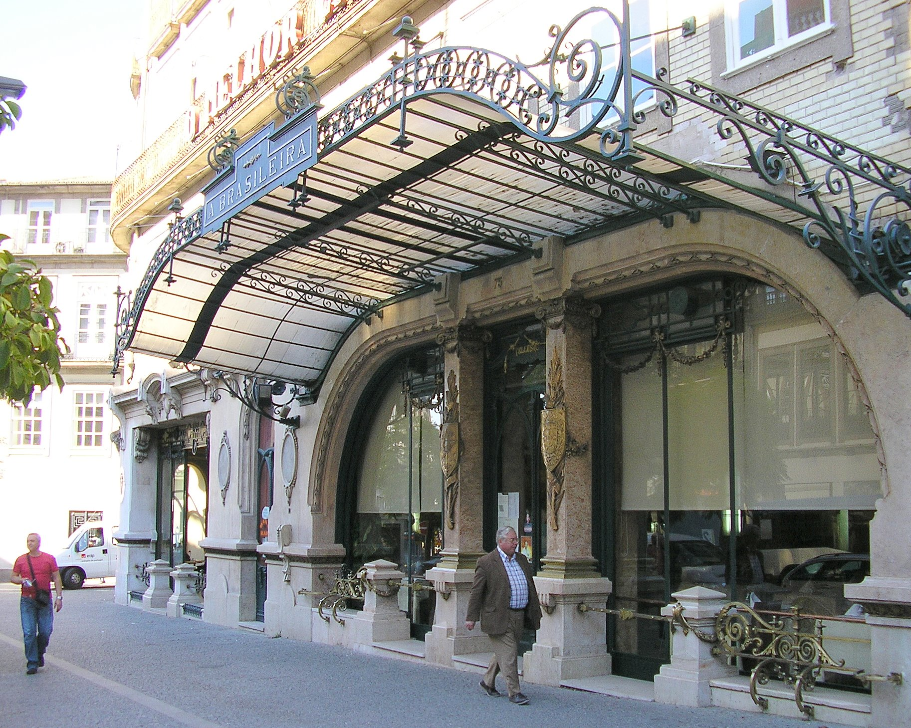 "A Brasileira" café in Porto, Portugal